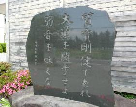 県ヶ丘高校生徒通用門正面の「三大精神」の碑（西川久壽男書 1991年（平成3年）11月建立）